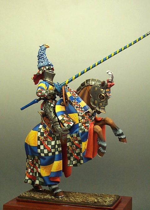 Regnier Pot